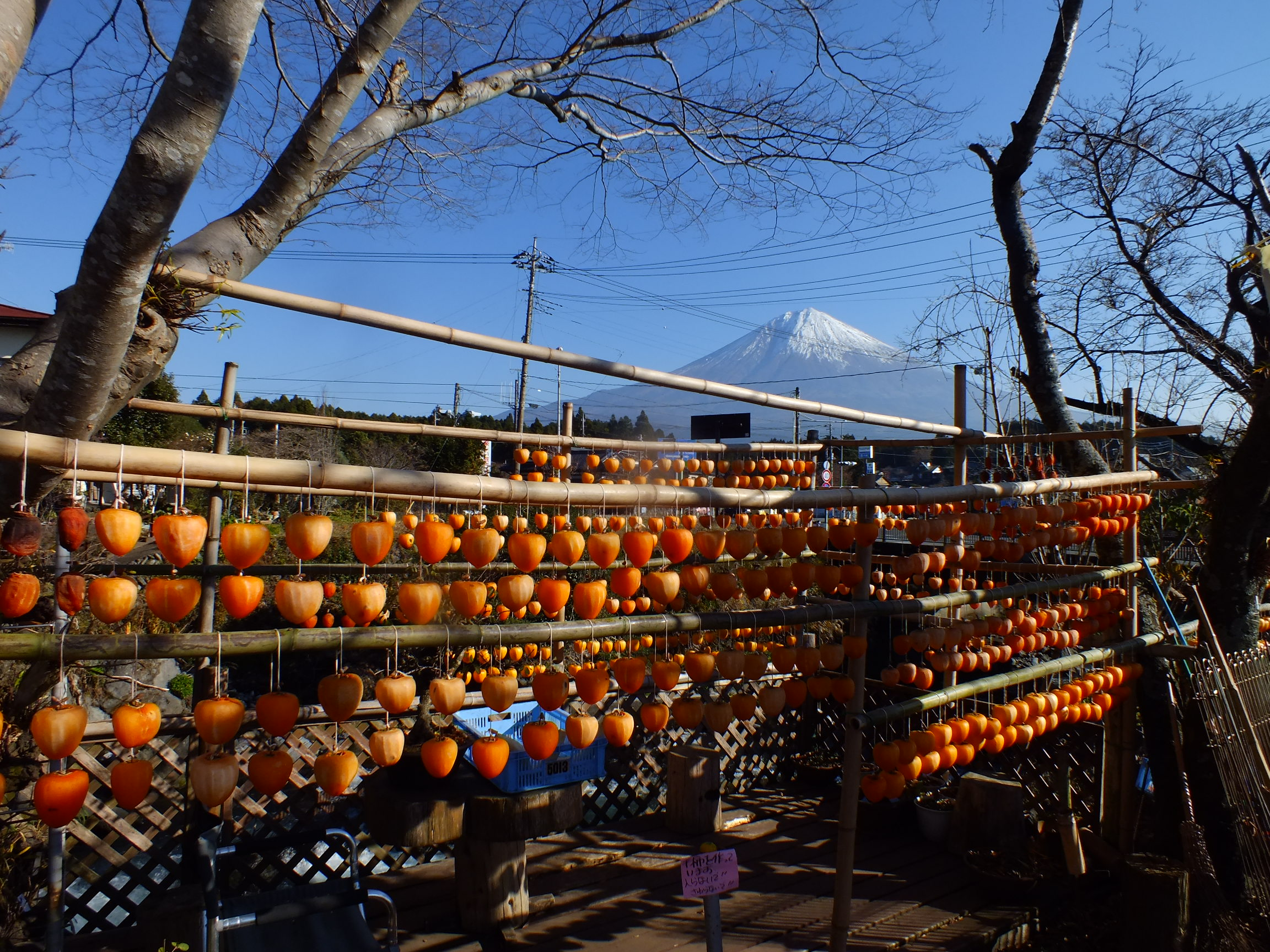 Persimmon drying in Fujinomiya,Shizuoka,Japan(吊るし柿白糸の滝下流)